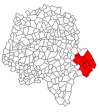 Carte de situation de la communauté de communes de Montrésor dans le département d'Indre et Loire